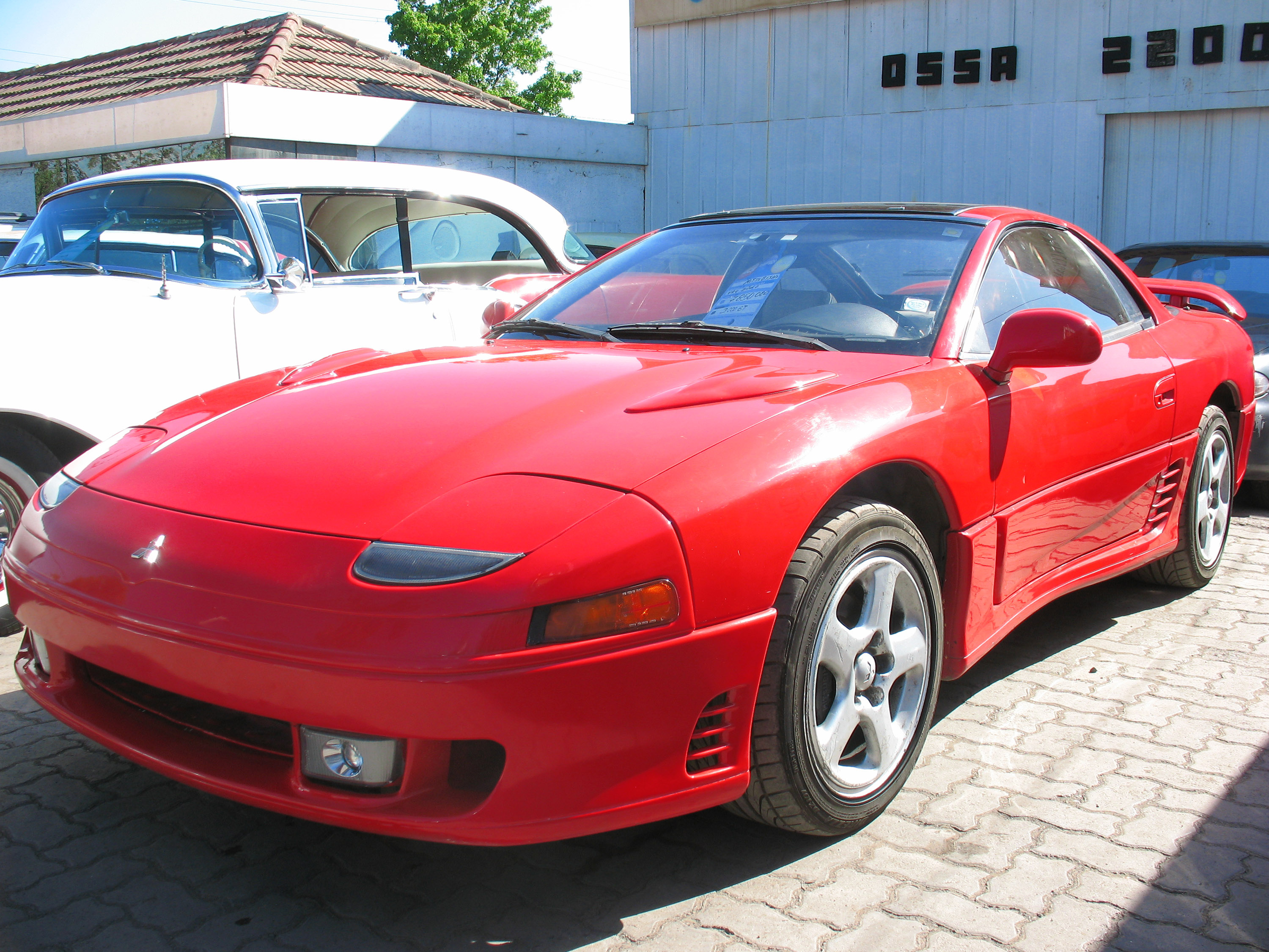 Mitsubishi 3000 GT VR-4 1992